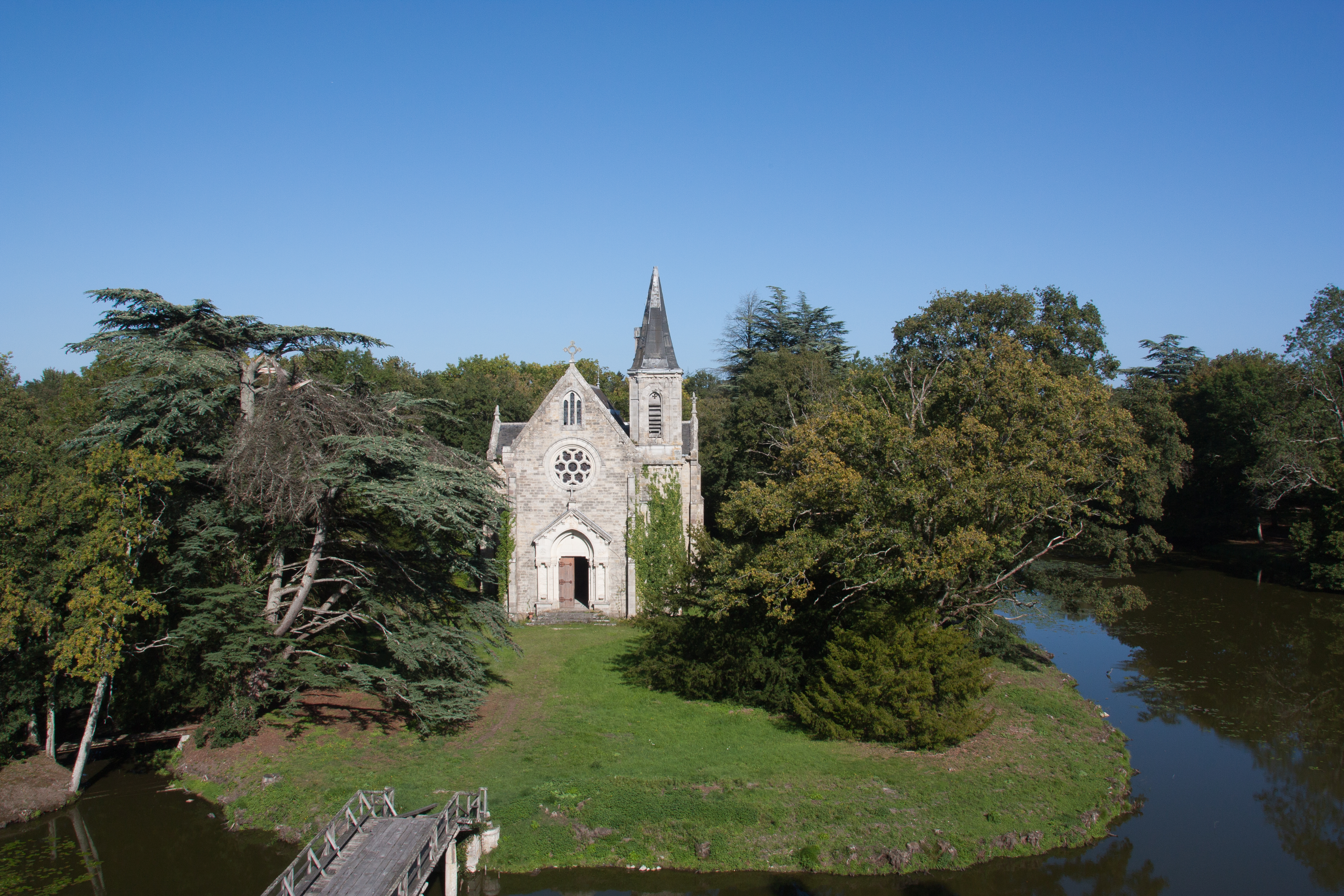 La chapelle dans le parc du Château de la Ferté - La Ferté-Saint-Aubin, Loiret, France.